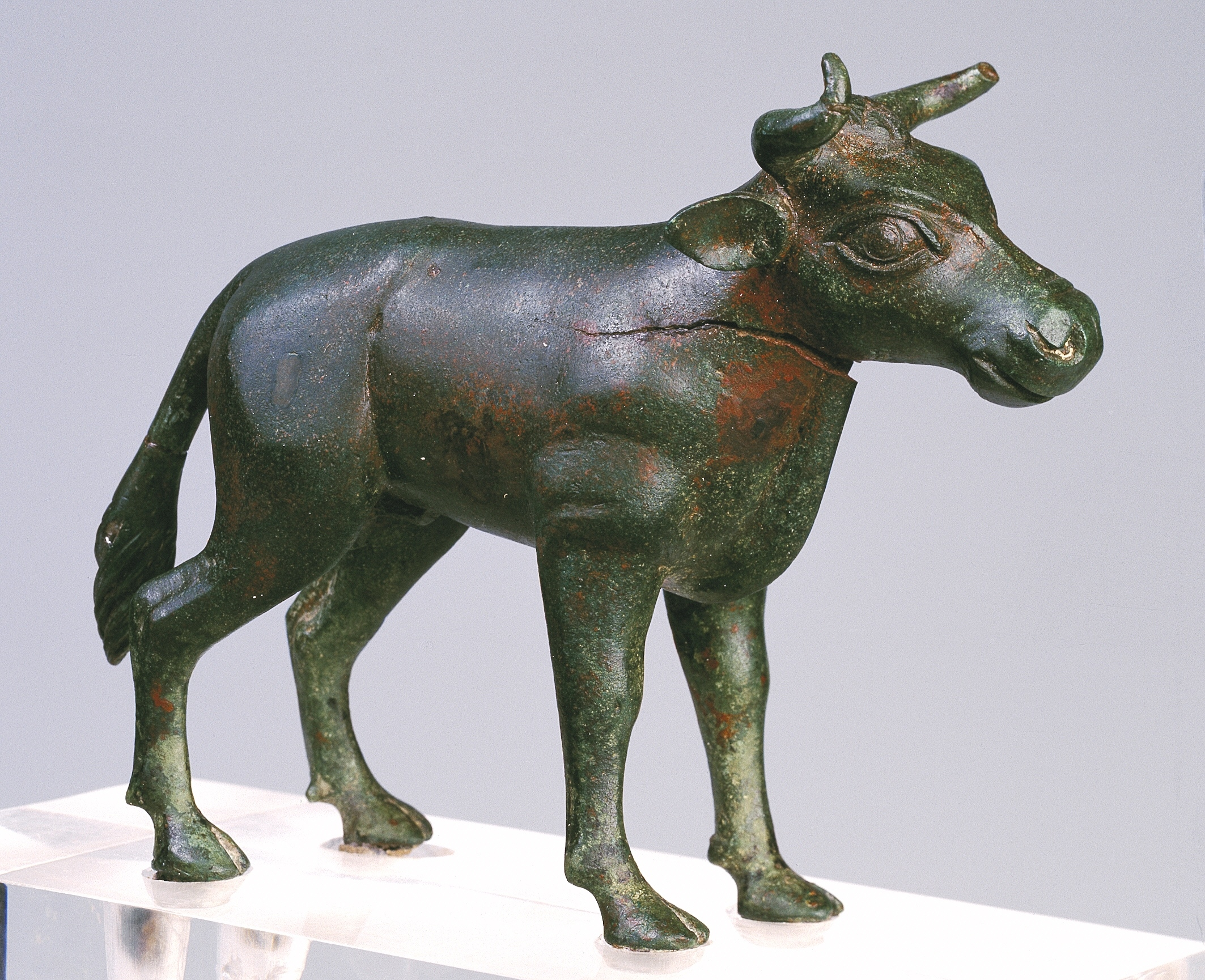 Brauet de Torralba